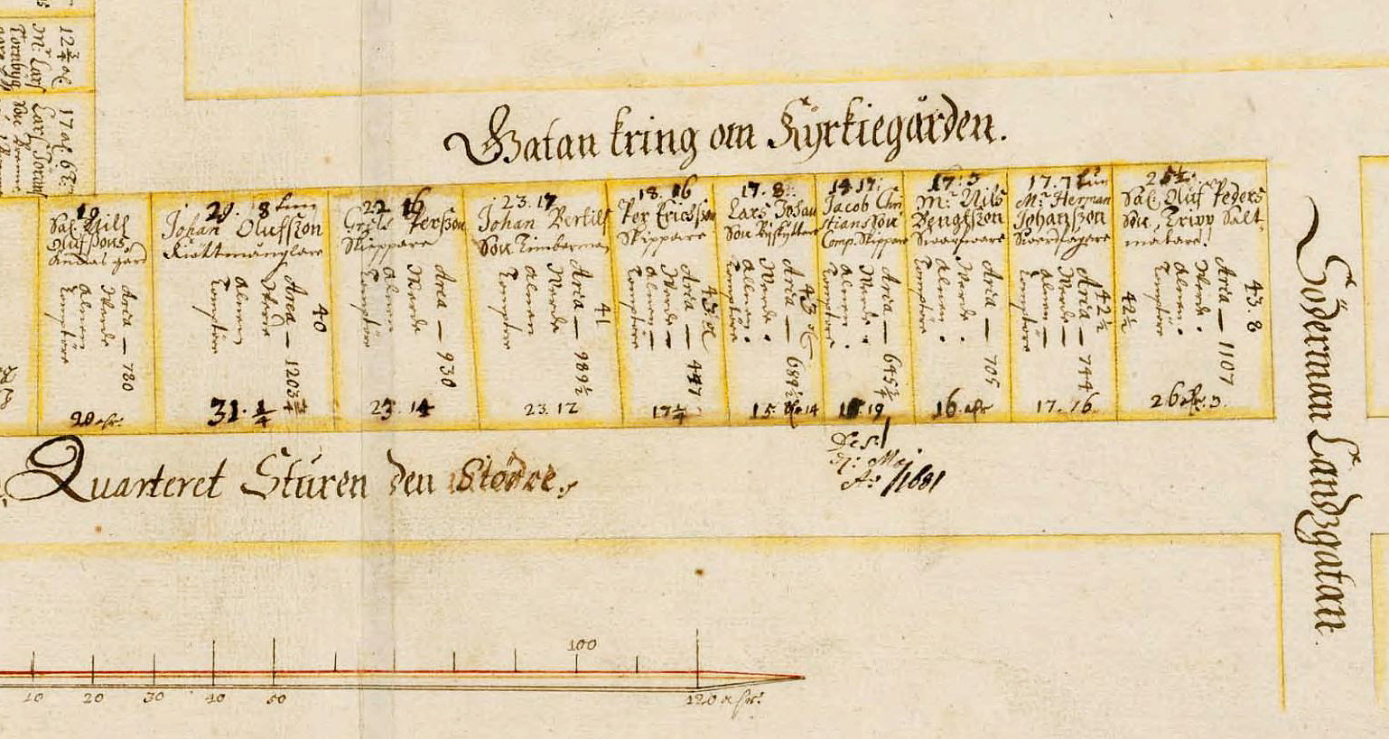 Dagens kvarter Sturen minsta